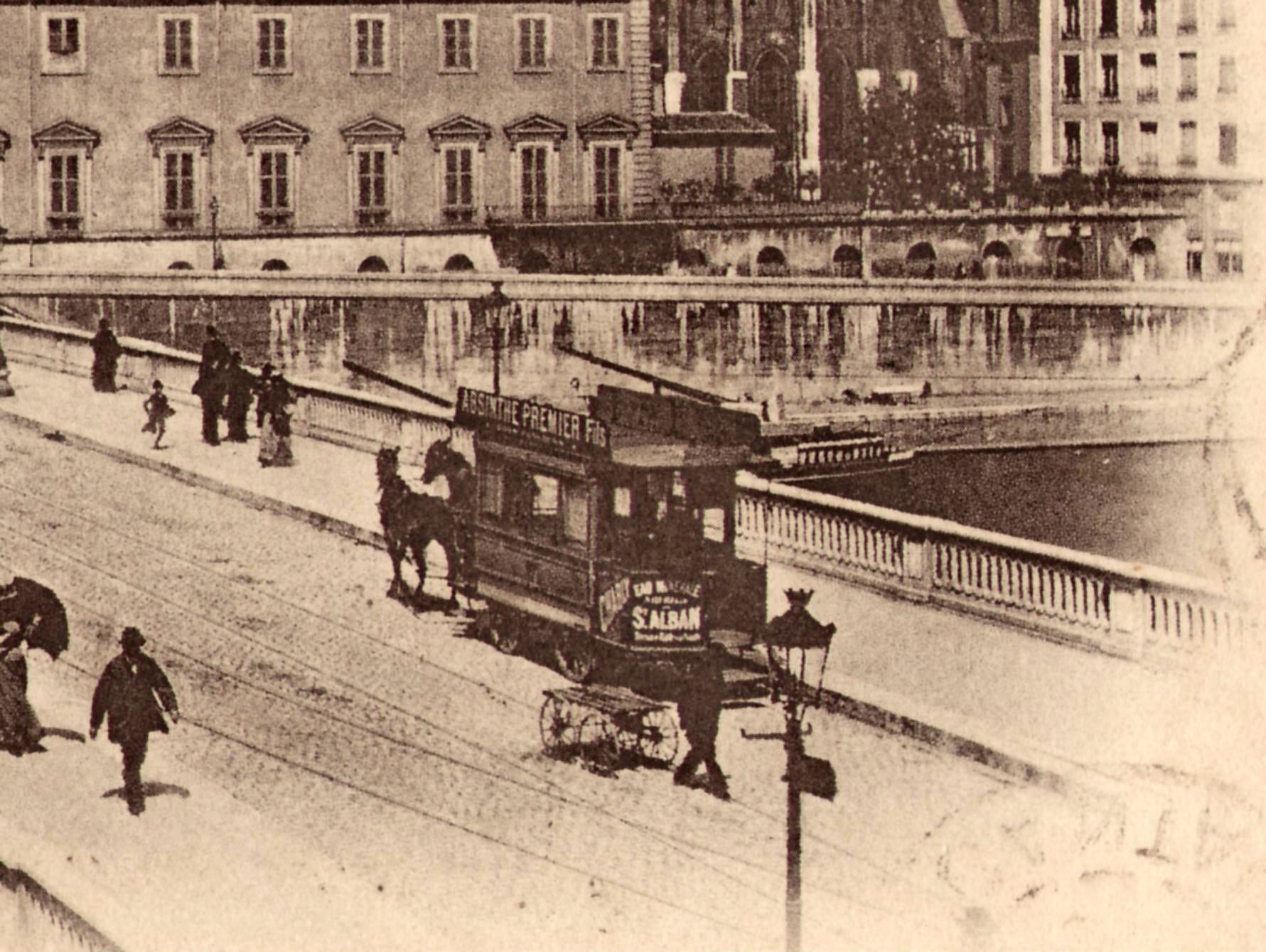 Détail d'une carte postale ancienne éditée par ND, n°19 - LYON - Le Pont Tilsit et le Coteau de FourvièresVue d'un omnibus hippomobile sur l'actuel pont Bonaparte - Il semble s'agir d'un "Car Rippert"